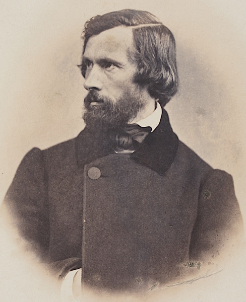 Joseph von Keller (* 1811; † 1873), Porträtfoto von Mathias Radermacher, undatiert.